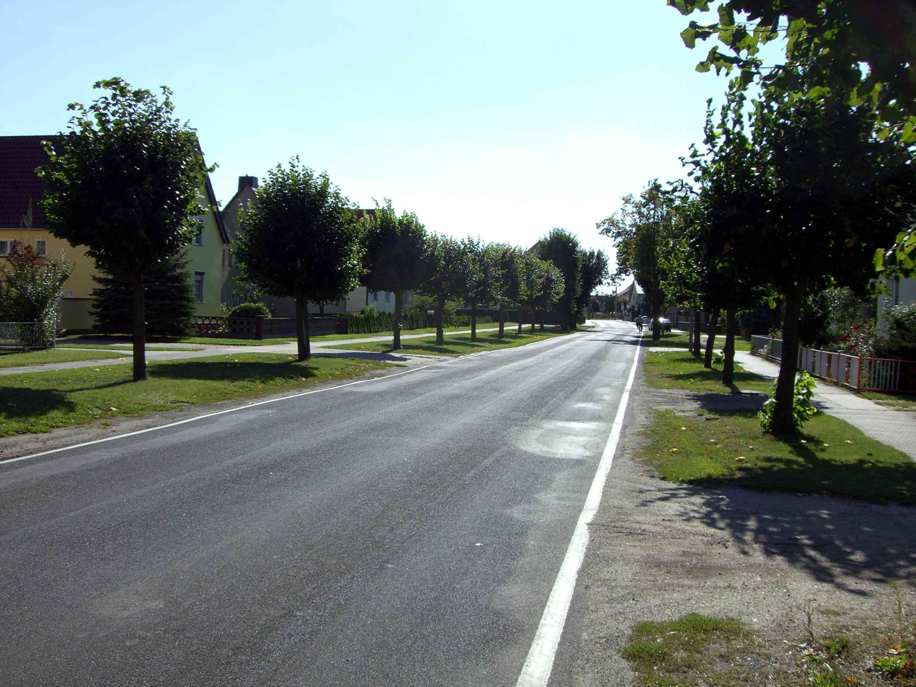 Reichenhain